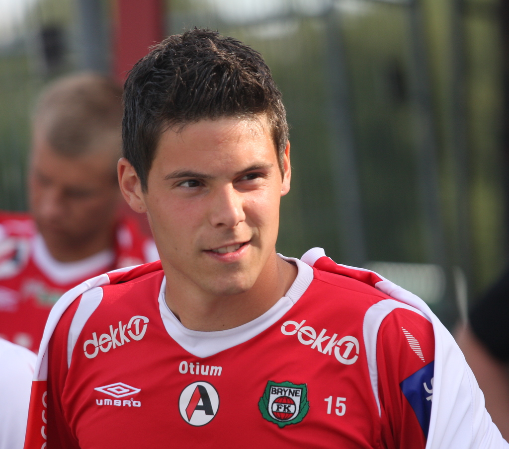 Kenneth Monsen